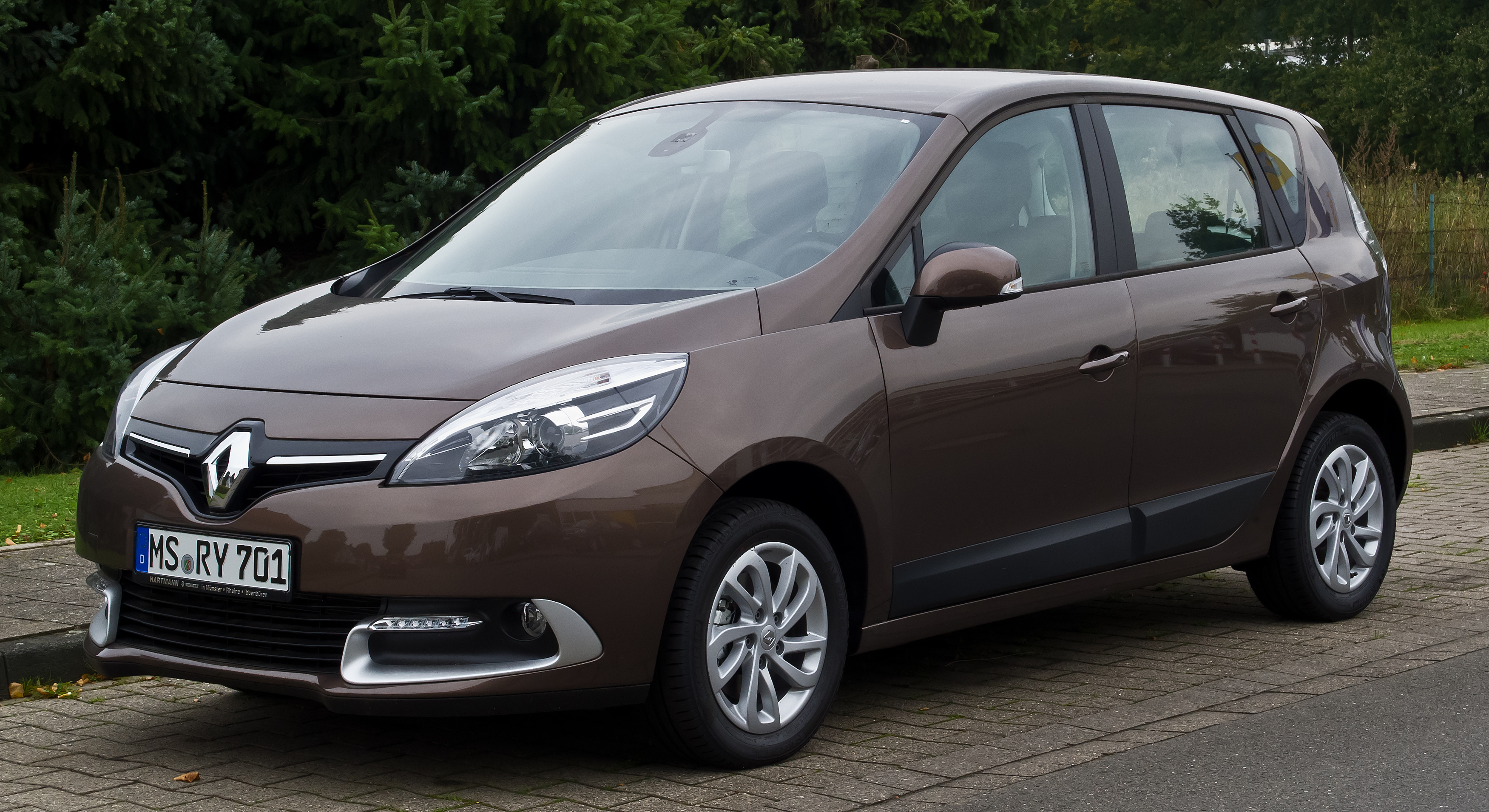 Renault Scénic Paris Deluxe 110 (III, 2. Facelift)